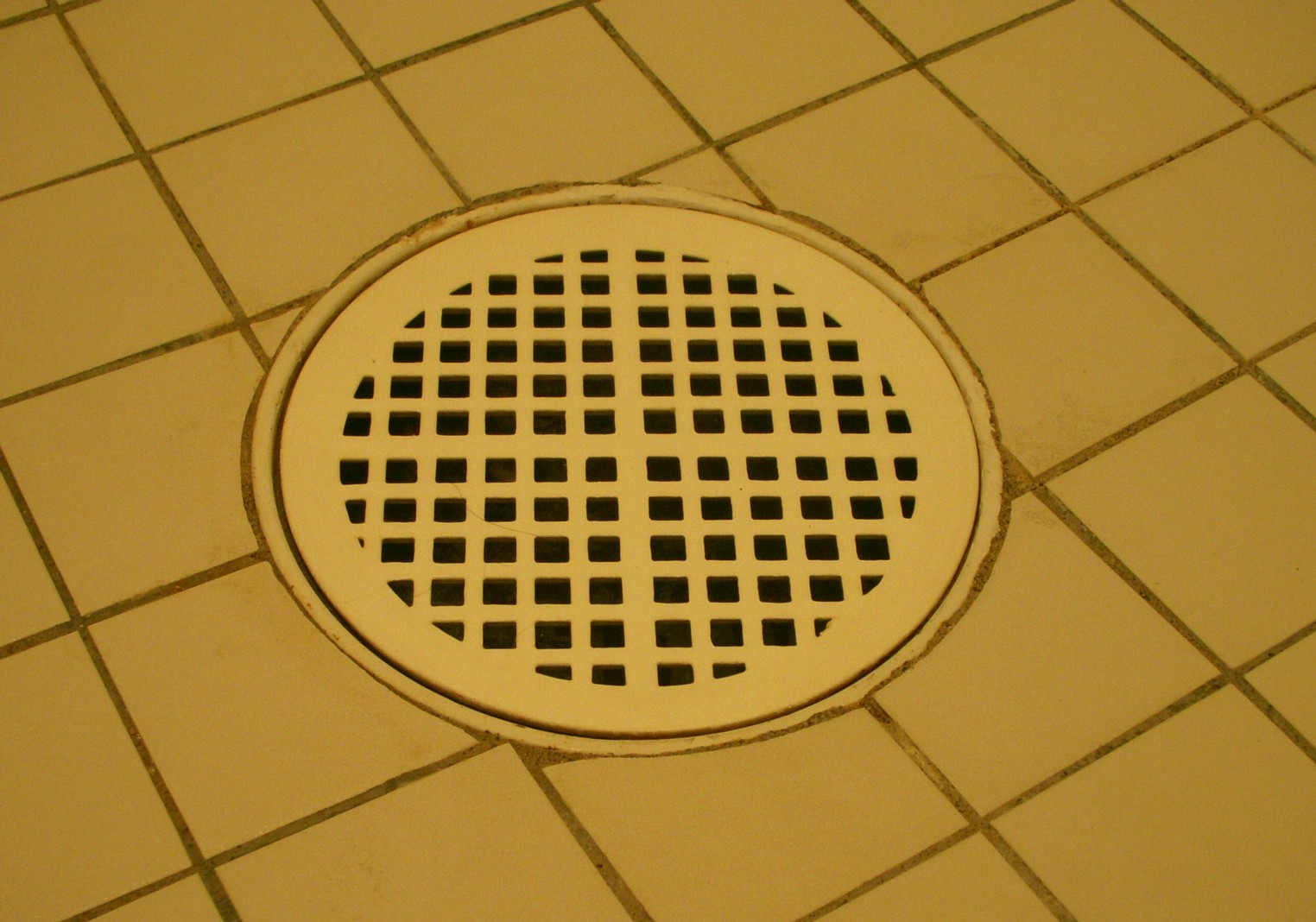 En golvbrunn i en dusch